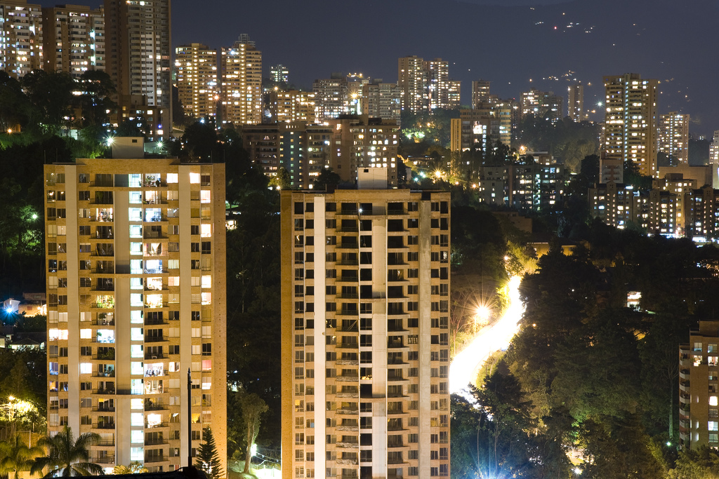 foto nocturna de El Poblado. Medellín Colombia